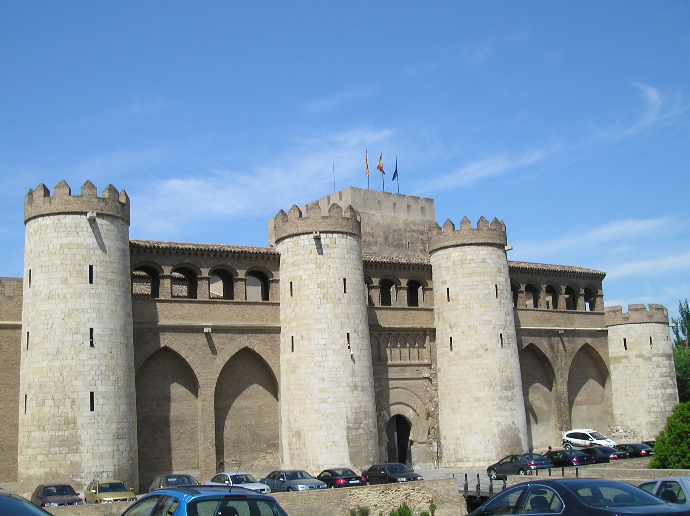 Las Cortes de Aragón I'm the copyright holder but I donate it.